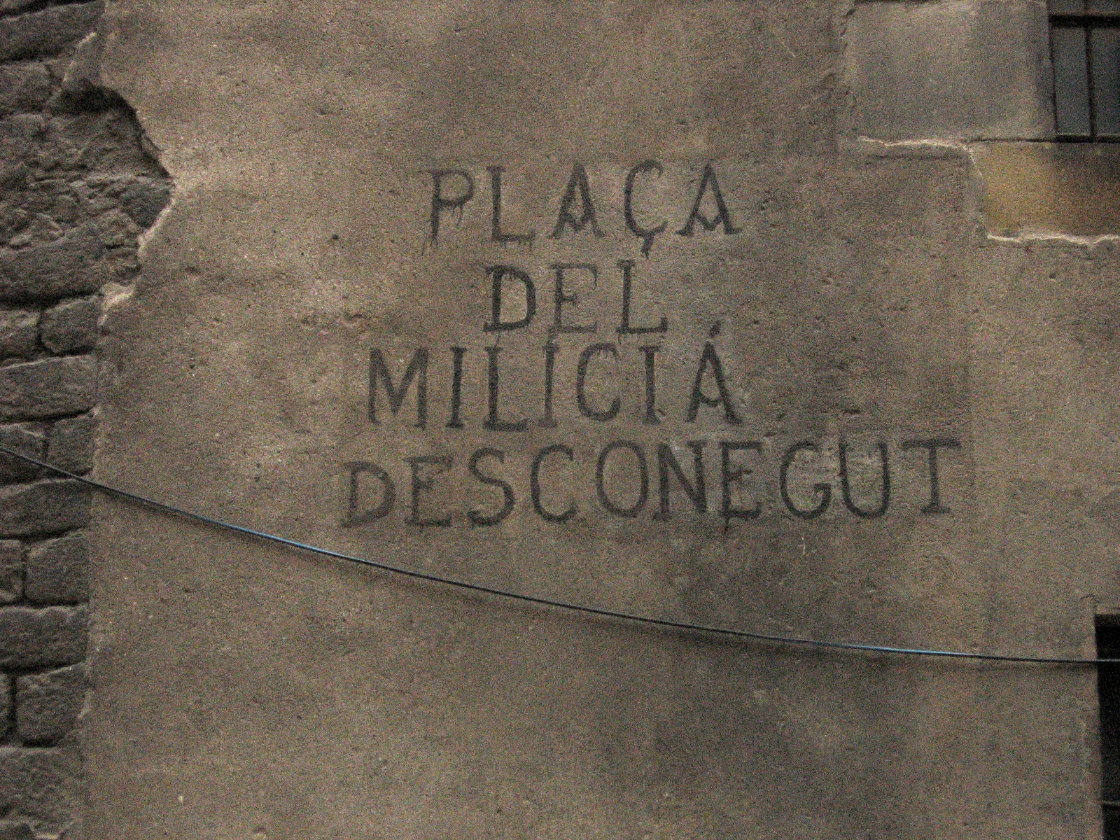 Plaça del Miliciá Desconegut, Barcelona 1938. Plaça de Sant Josep Oriol, Barcelona 2008.